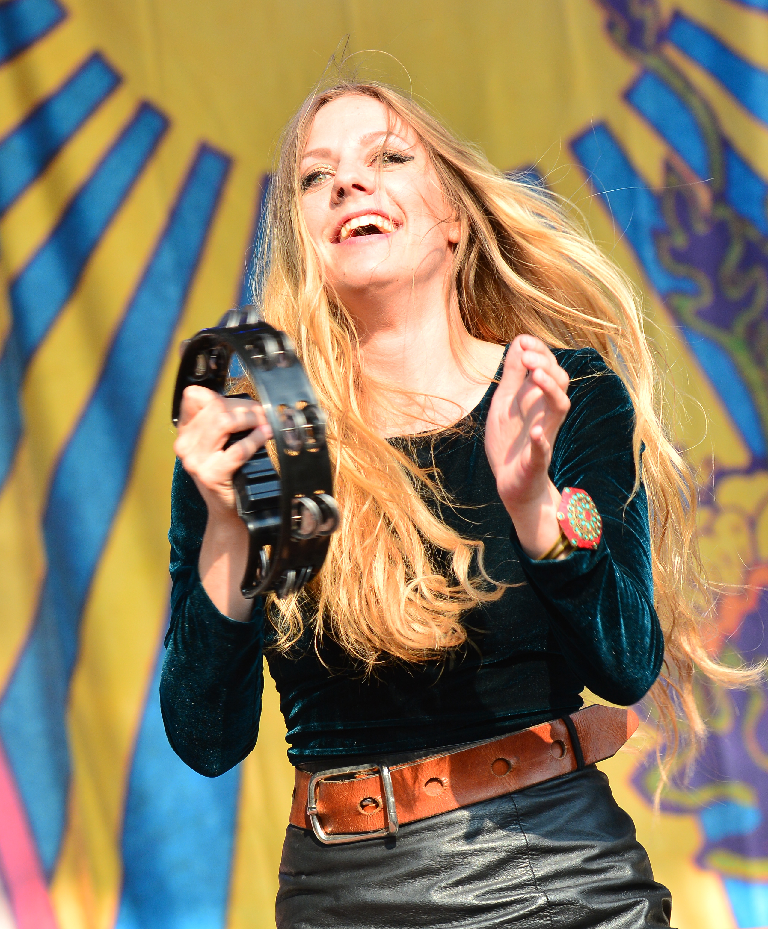 Blues Pills beim Reload Festival 2015